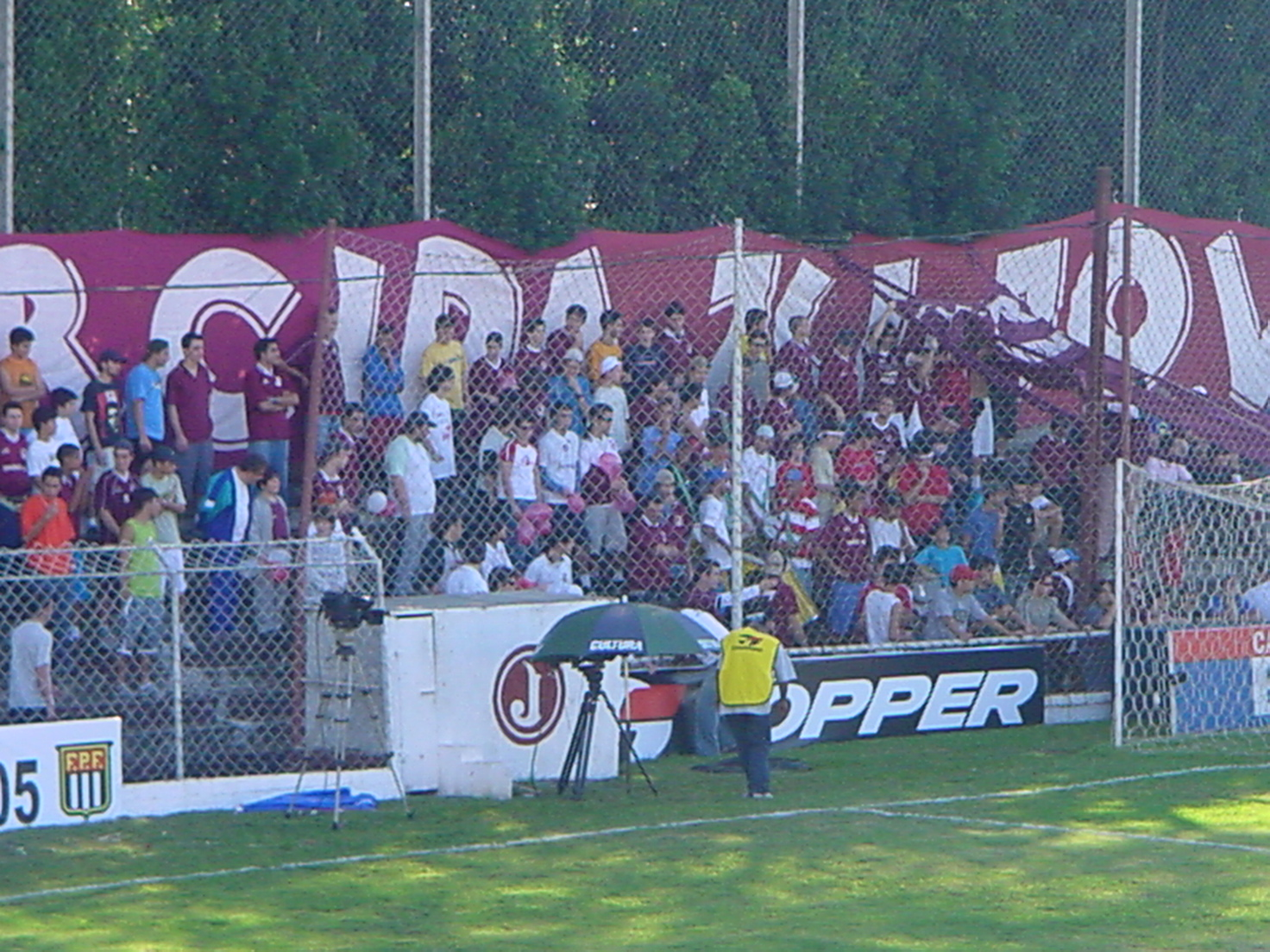 Juventus supporters at Rua Javari Stadium